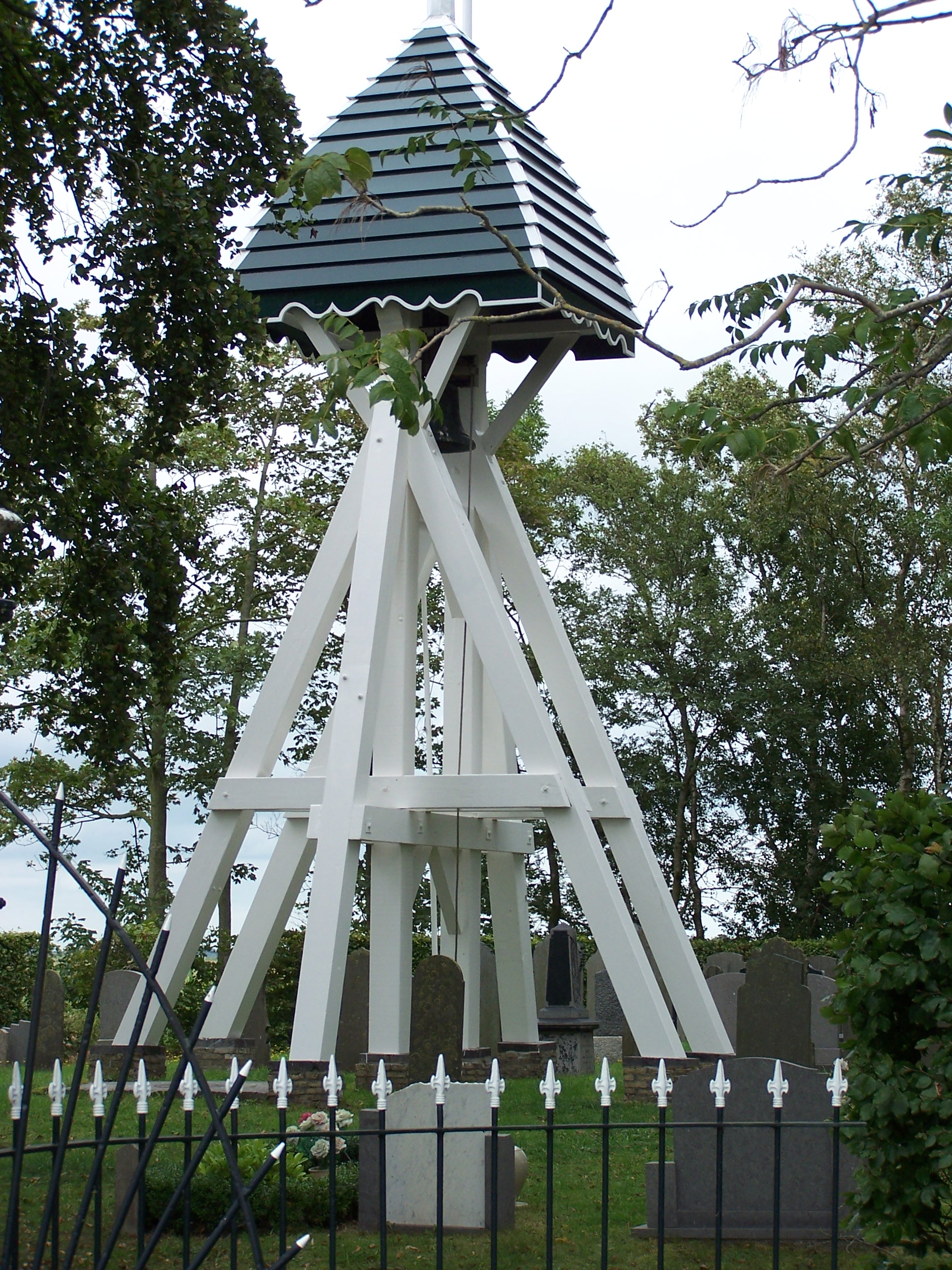 Klokkenstoel in Snikzwaag